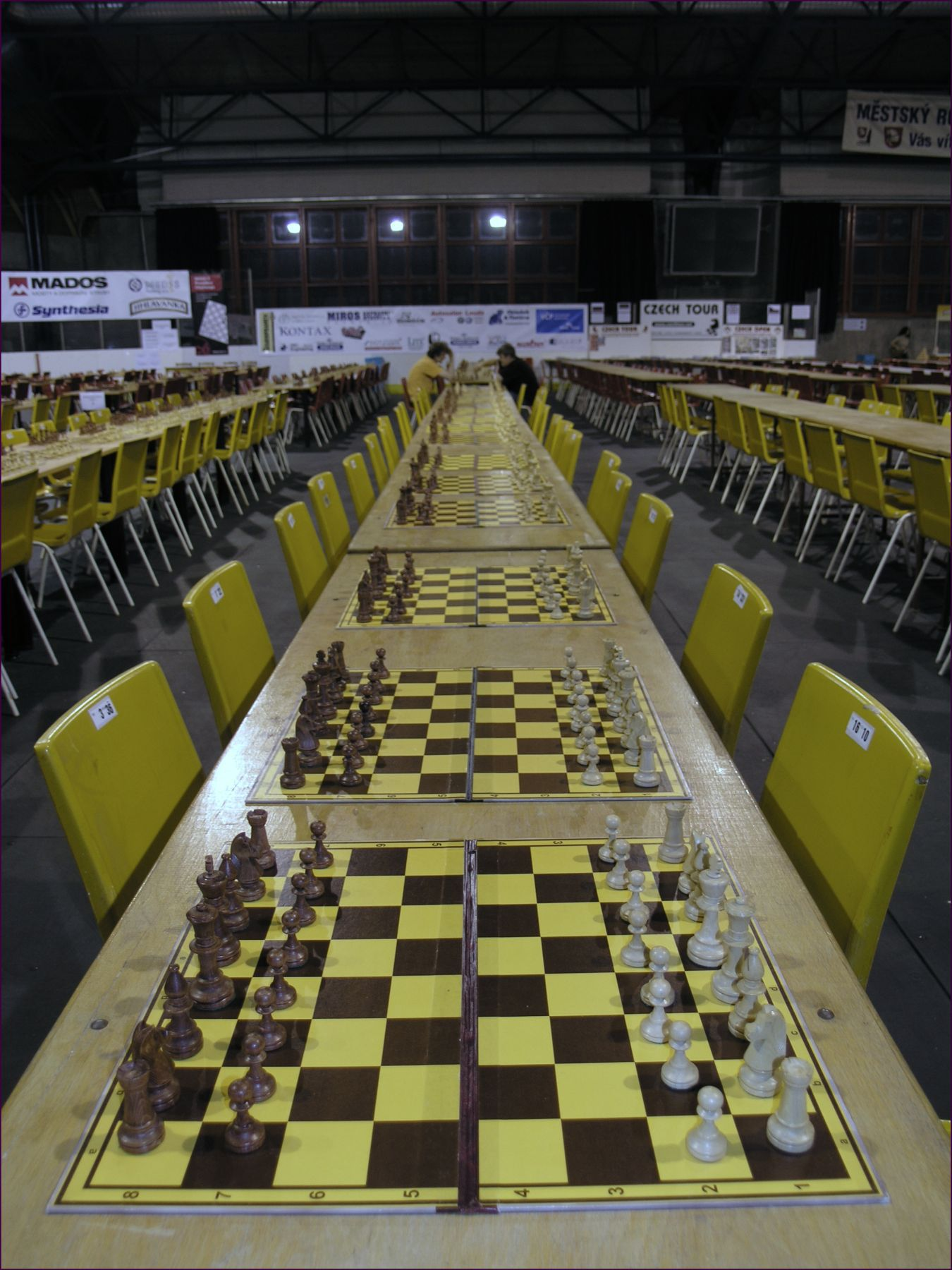 Czech Open 2007 - Pardubice